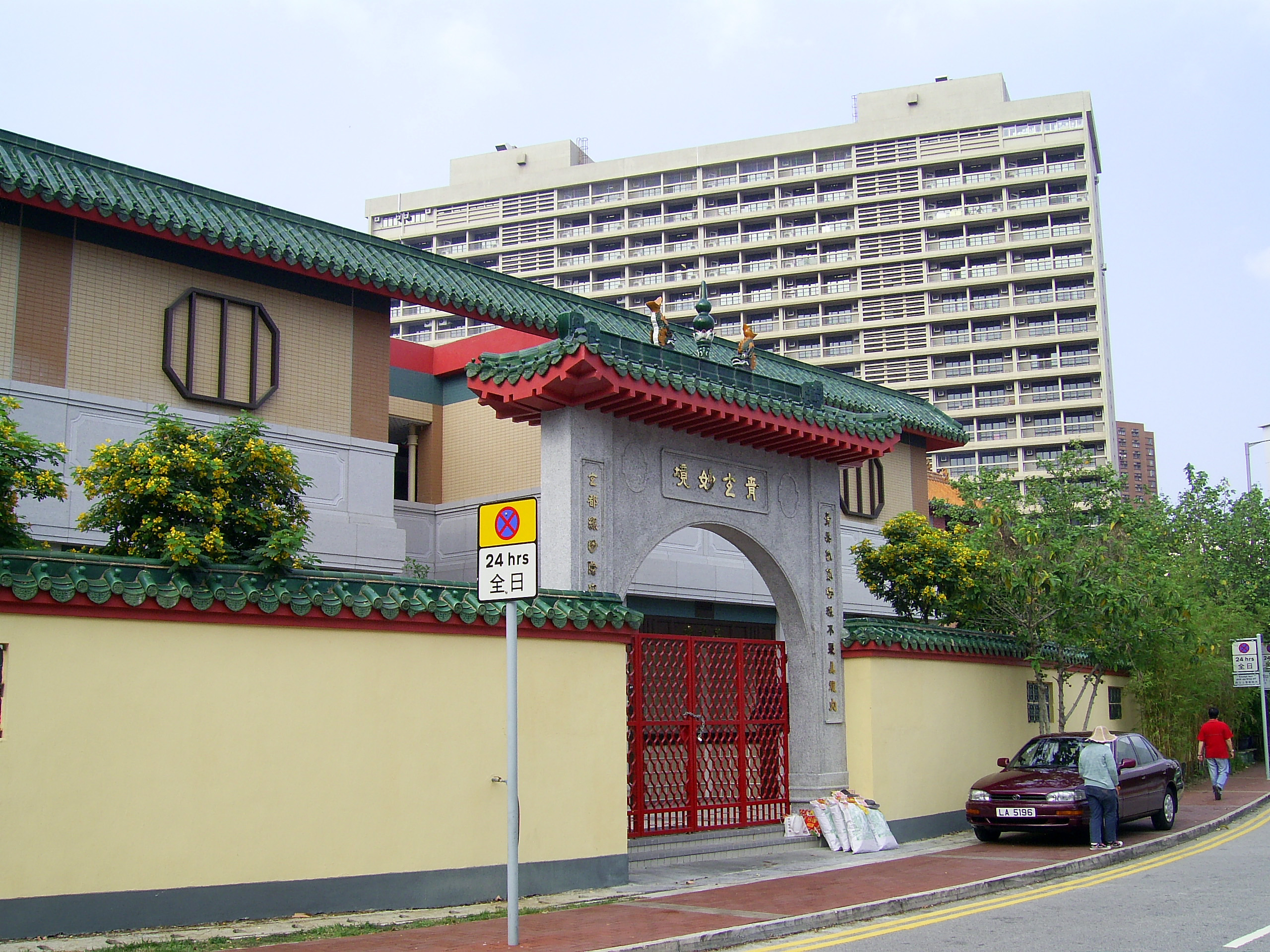 中文（香港）: 青松仙苑